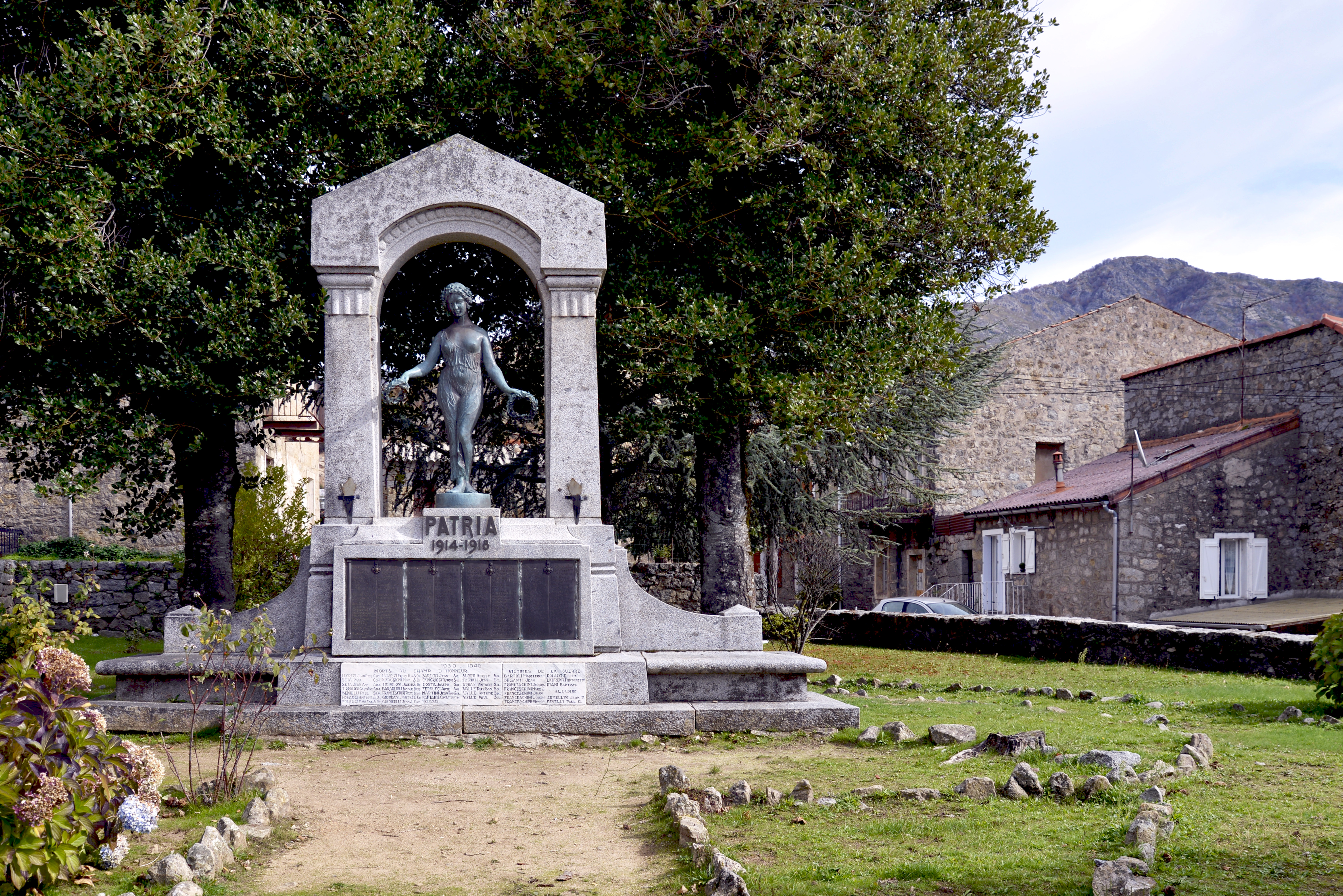 Bastelica, Prunelli (Corse) - Monument aux morts à Dominicacci